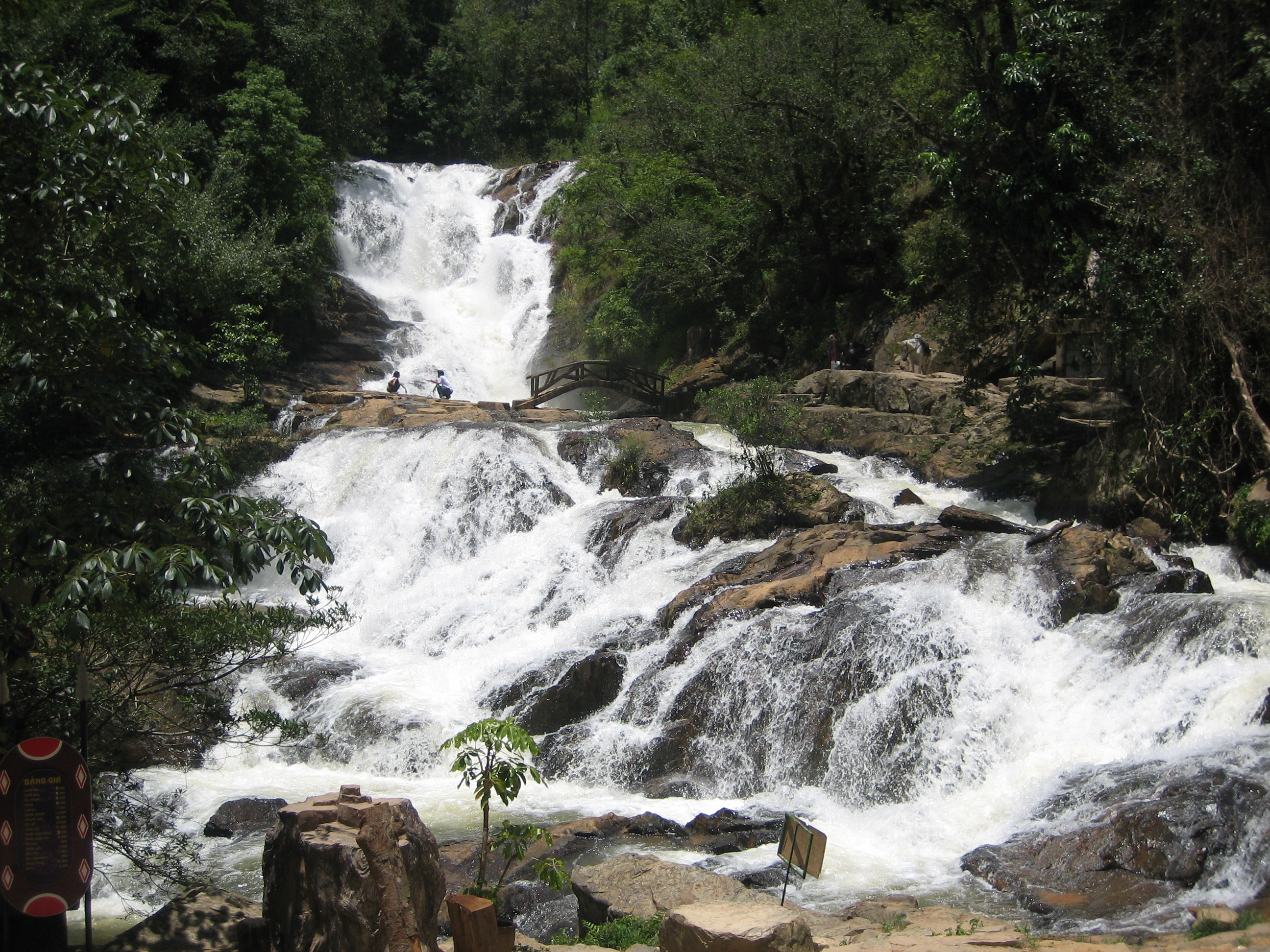 Datanla Waterfall